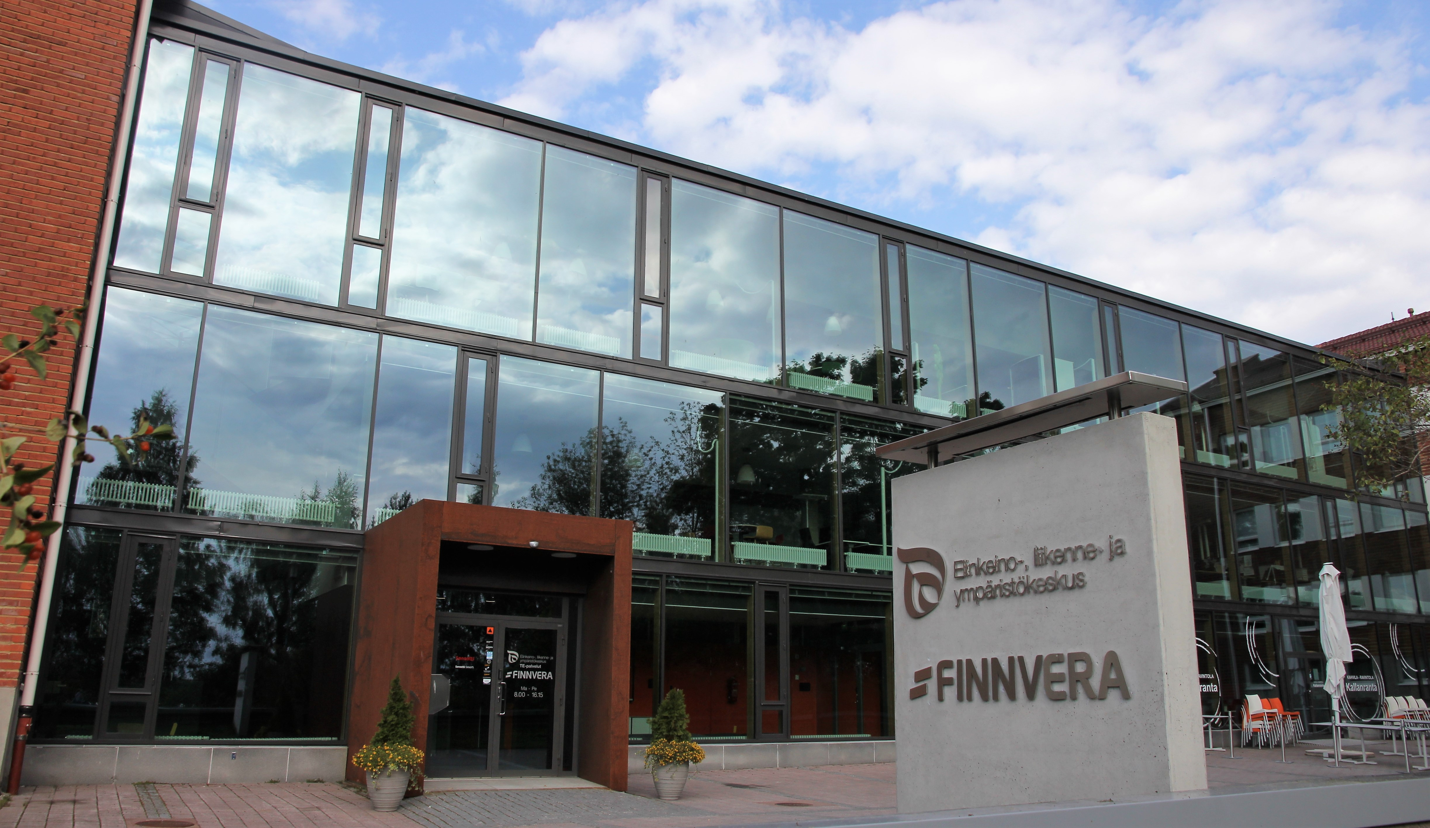 Finnvera ja Pohjois-Savon ELY-keskus Kuopion Väinölänniemen kaupunginosassa, osoitteessa Kallanranta 11, Kuopio. Finnveran pääkonttori sijaitsee rakennuksessa, joka on yksi usean toimistokäytössä olevan rakennuksen kokonaisuudesta Kuopion Piispanpuiston ja Väinölänniemen kaupunkipuiston välisessä korttelissa. Rakennukset kuuluvat valtakunnallisesti merkittävänä rakennetun ympäristön kohdealueena tunnettuun (RKY-kohde) Kuopion Piispanpuiston ympäristö ja kuurojen koulu alueeseen.